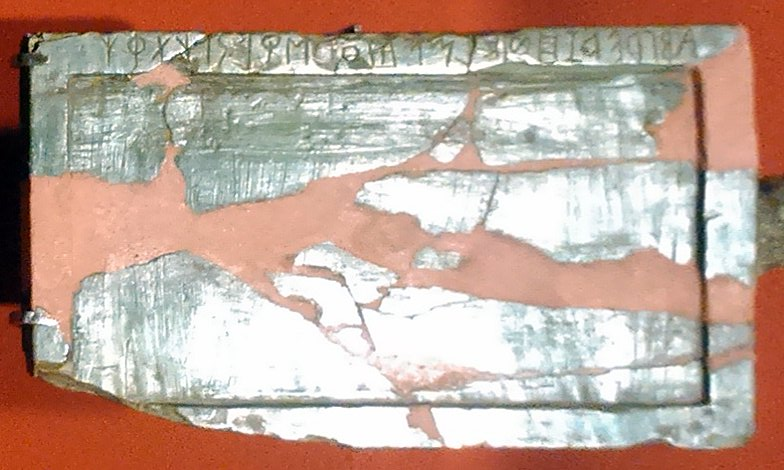 Tablette de Marsiliana d'Albergna -Grosseto -Italie. Avec abécédaire de l'alphabet étrusque. VIIe siècle av. J.-C. Musée archéologique national de Florence.